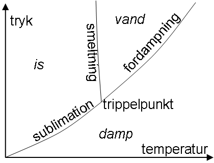 Skematisk fasediagram for vand. De viste akser har ikke nogen lineær skala. Tegningen skal benyttes til at forklare begrebet trippelpunkt.